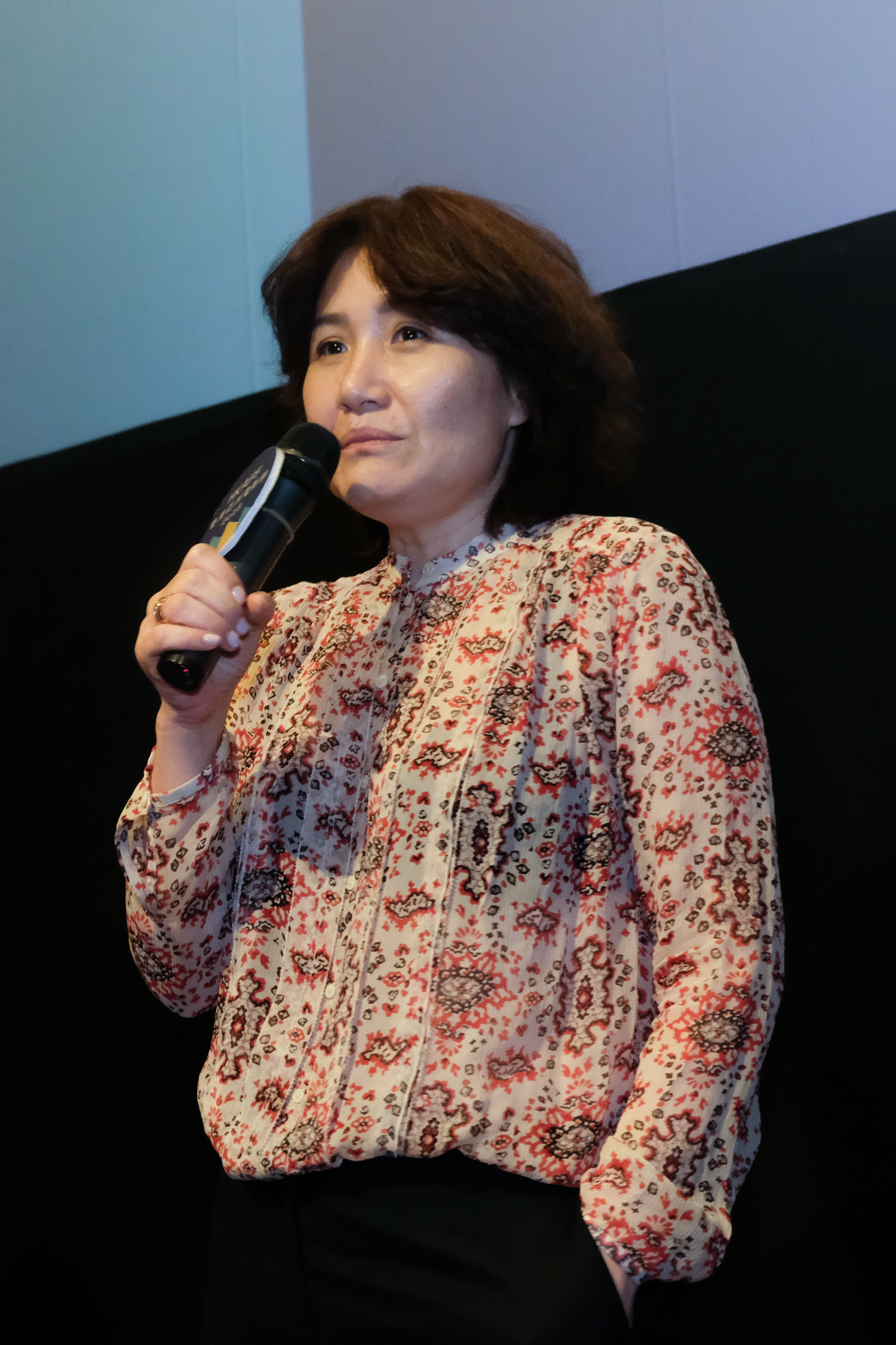 徐譽庭導演出席香港亞洲電影節2018。